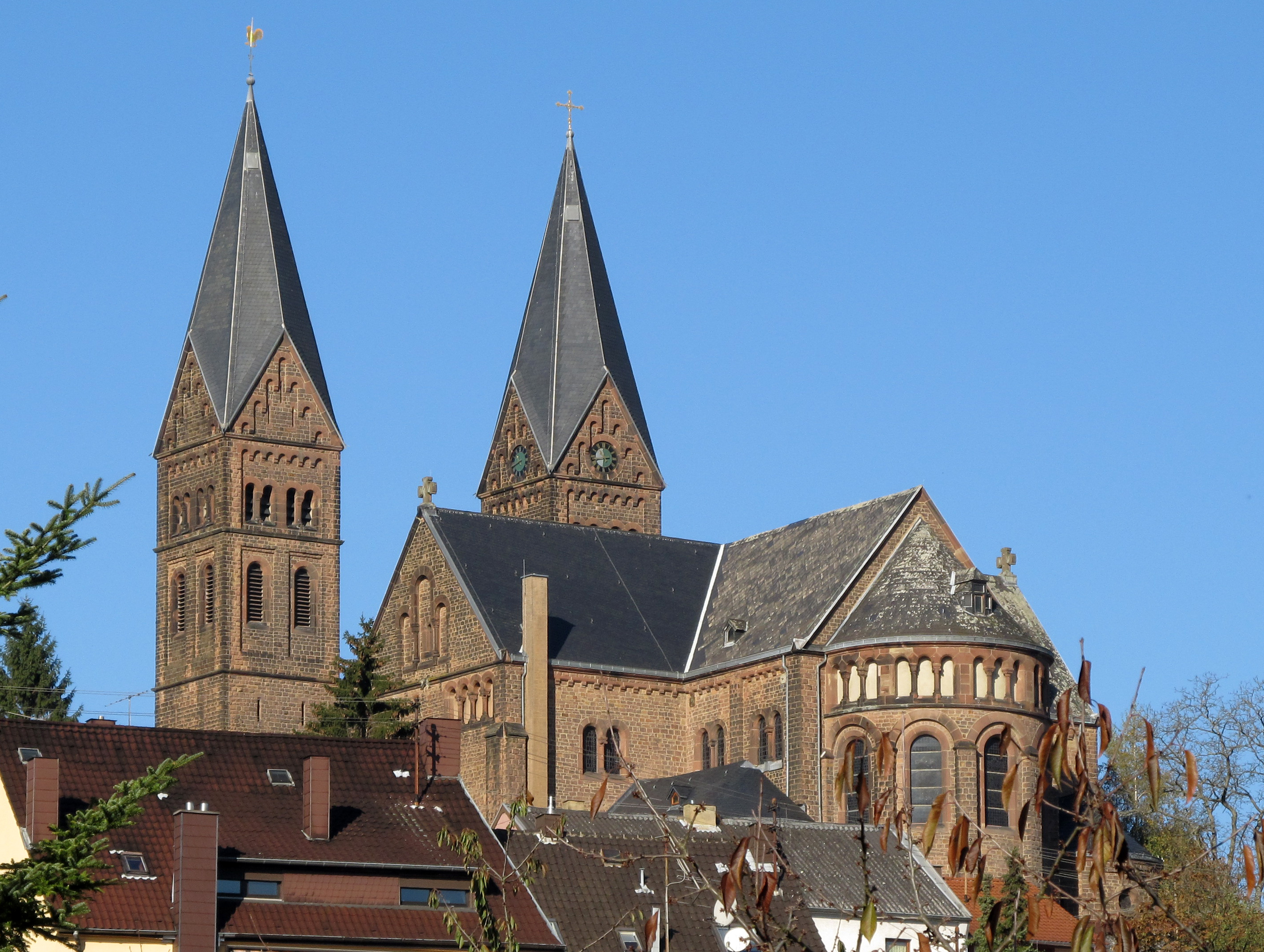 Die katholische Pfarrkirche St. Sebastian in Püttlingen, Saarland